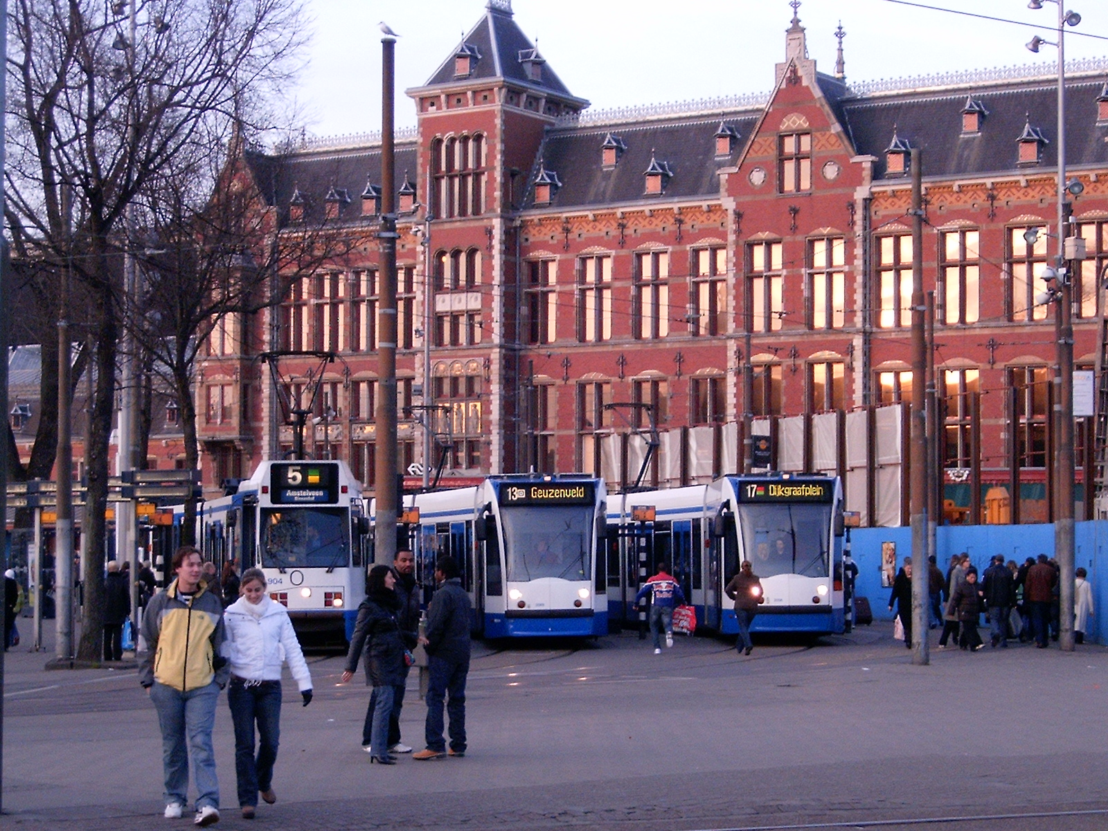 Trams in Amsterdam